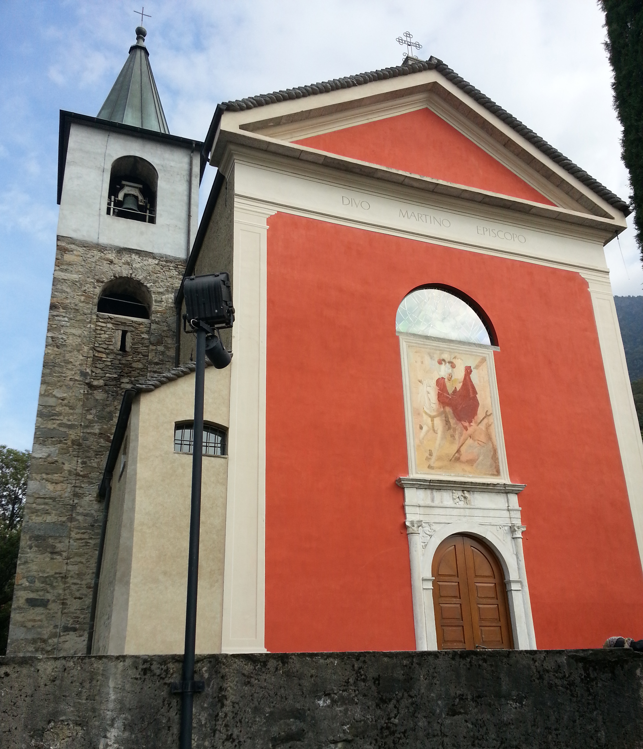 La chiesa parrocchiale di San Martino di Tours è un edificio religioso che si trova a Camorino, nel Canton Ticino.